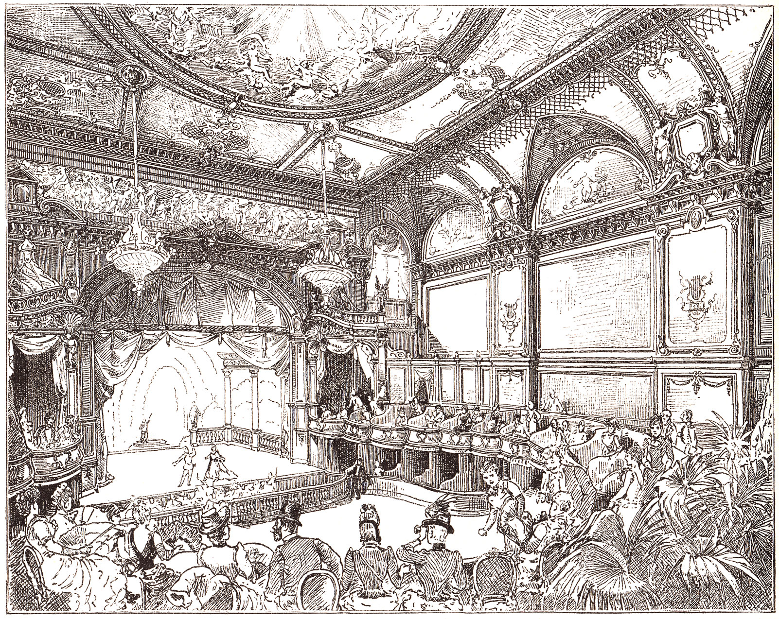 Berlin - Innenraum des Concordia-Theaters, später Apollo-Theater